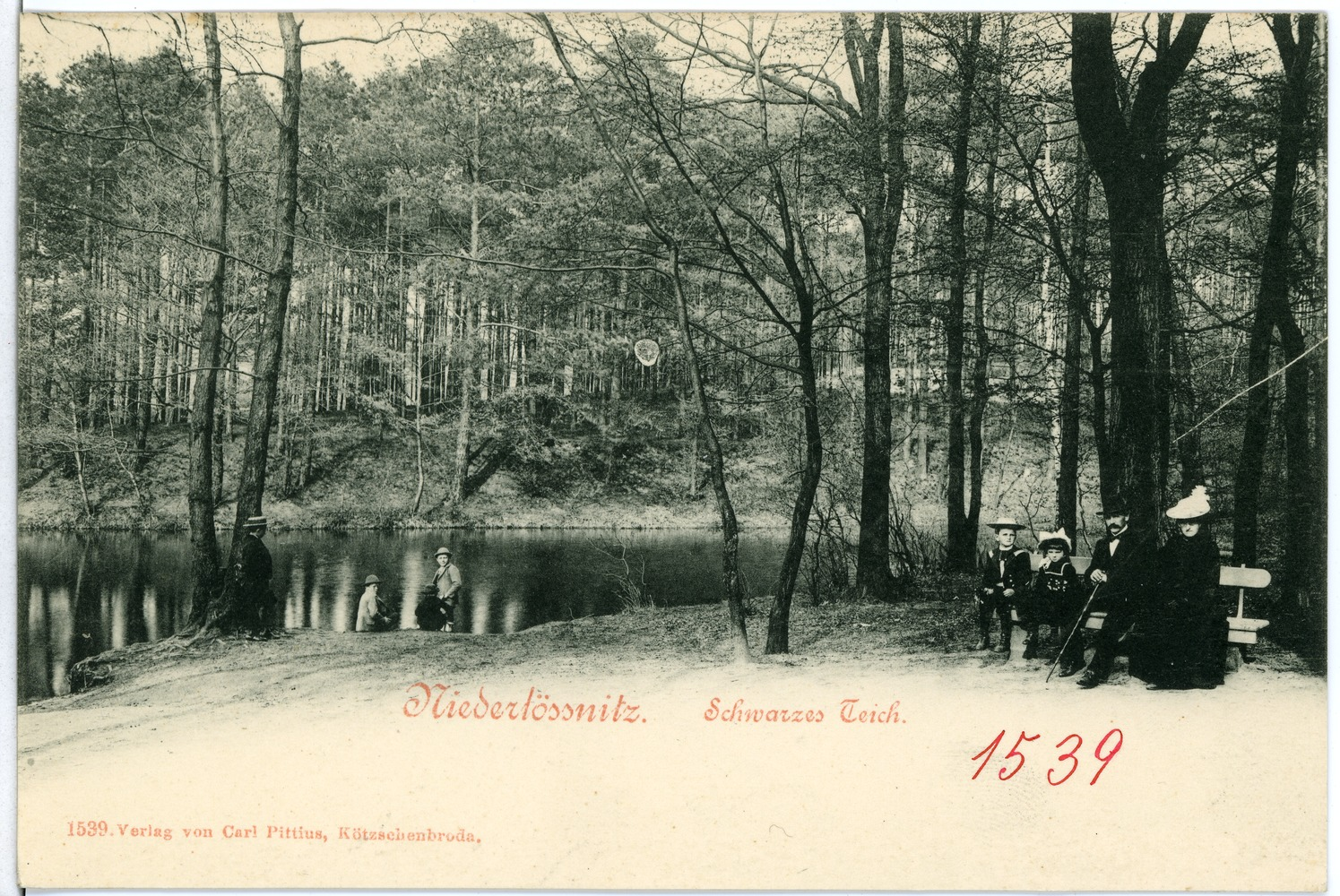 Niederlößnitz; Schwarzes Teich This postcard is from publisher Brück & Sohn in Meißen ( postcard has a unique number 01539 and is available in a higher resolution at the publisher. This images was uploaded in a cooperation project between Wikipedians and the publisher.